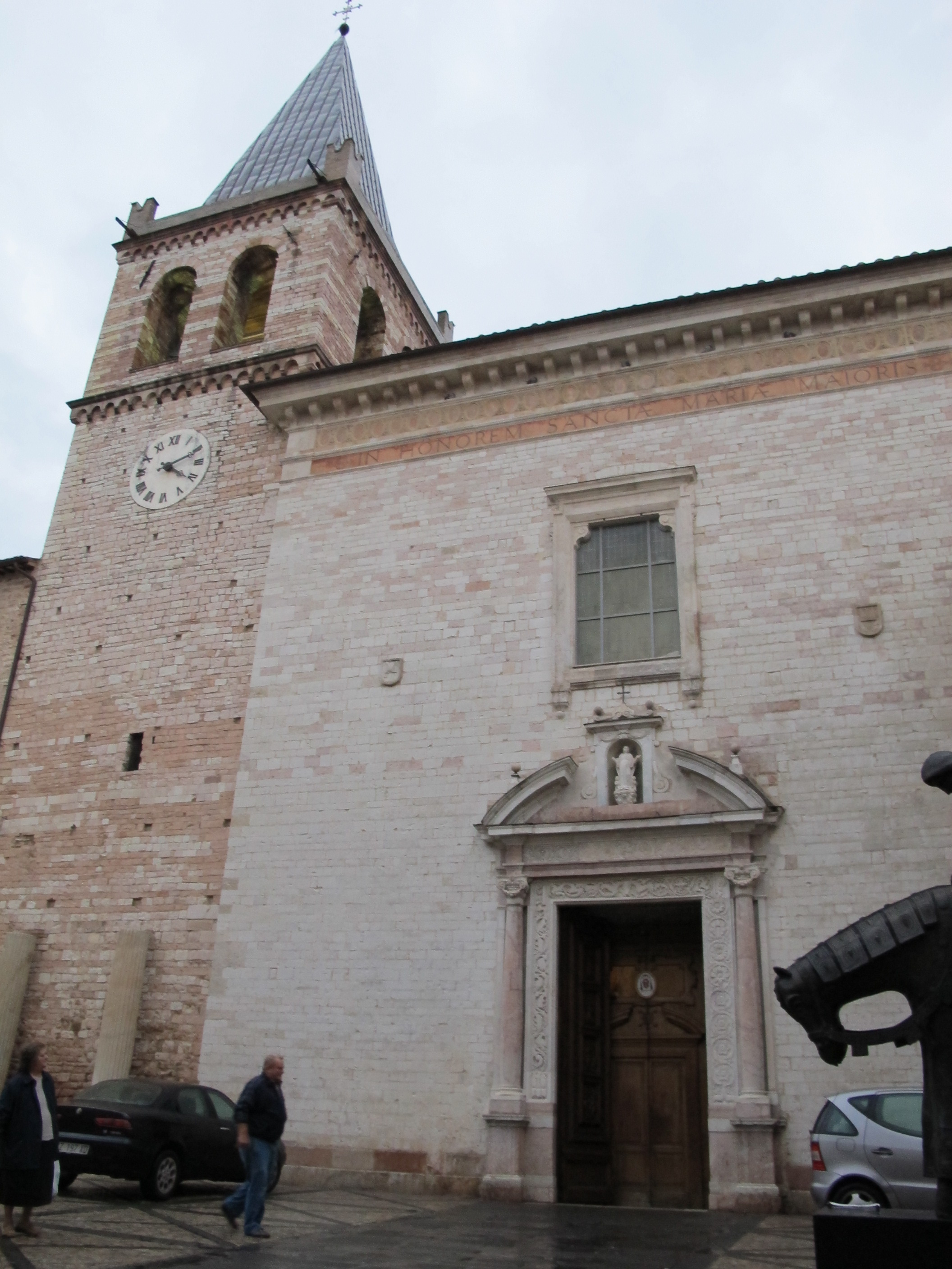 Spello, s. maria maggiore